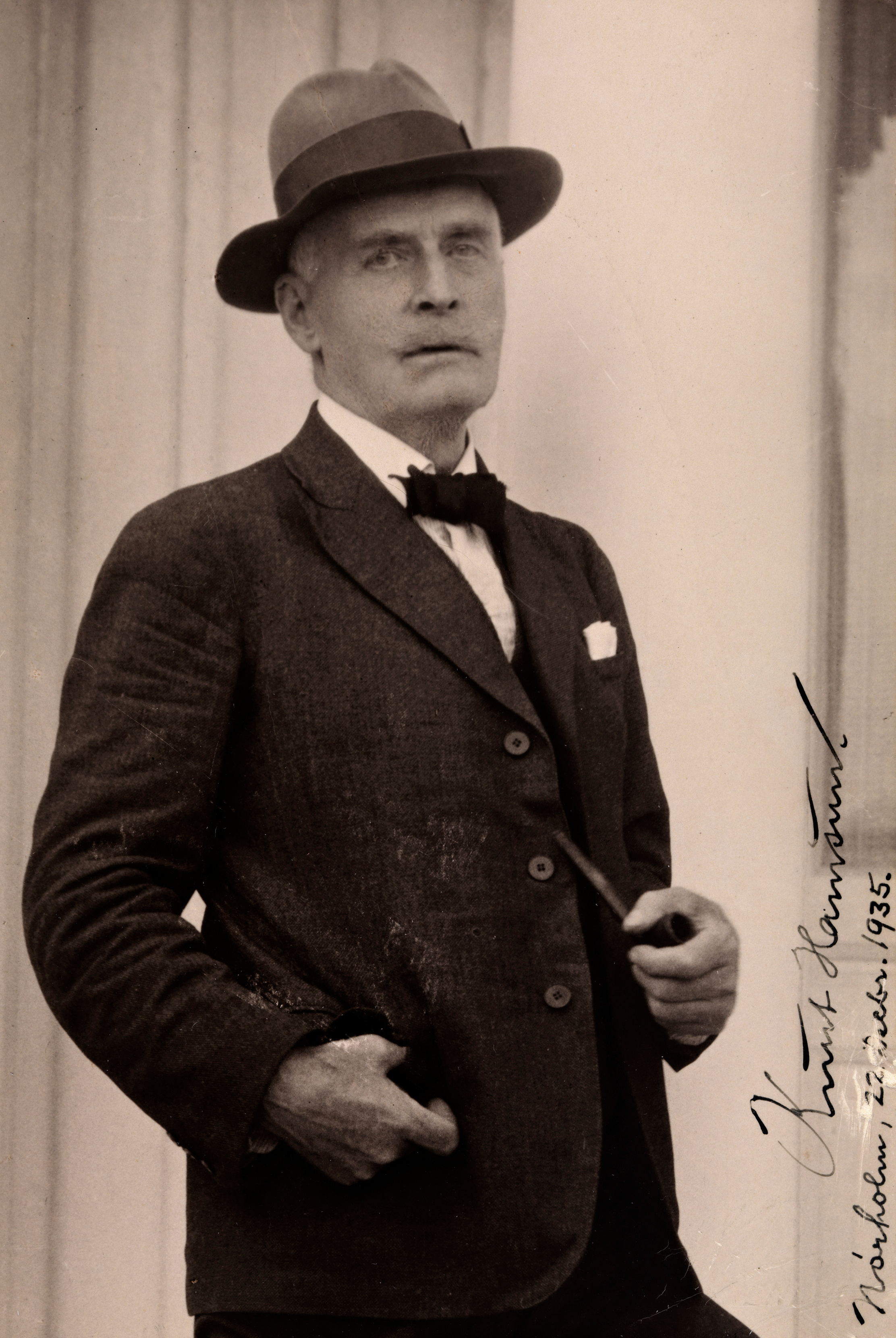 Knut Hamsun på Nørholm 1935.